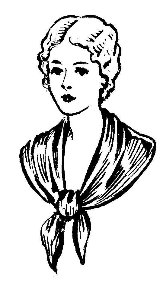 Fichu